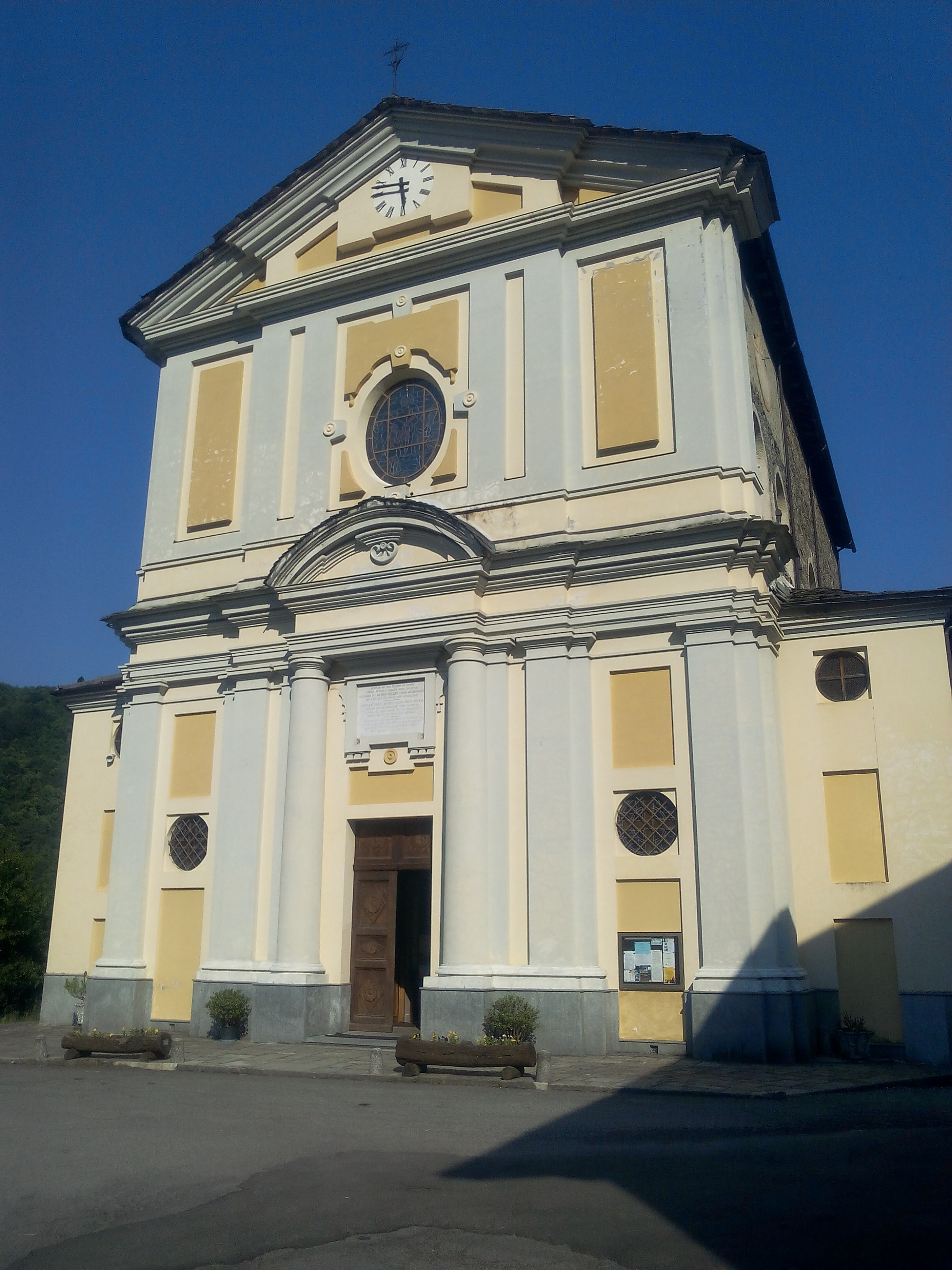 Mezzenile (TO): la chiesa